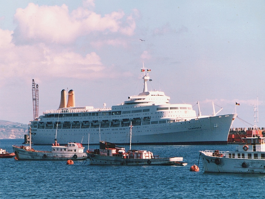 ss Canberra at Ponta Delgada, Azores